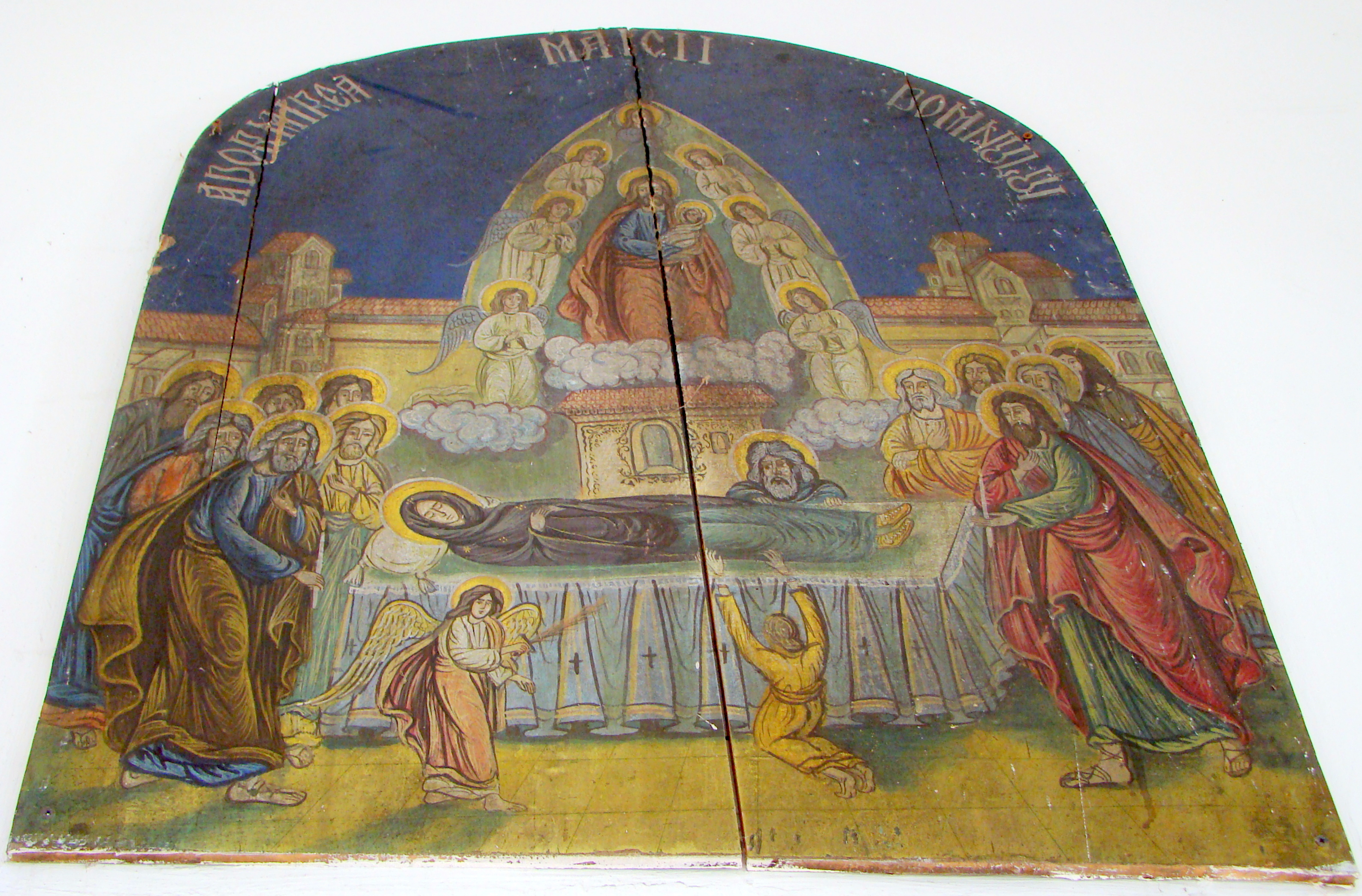 Biserica „Adormirea Maicii Domnului”, sat Voivodeni; comuna Voila 46 sec. XIII-XX